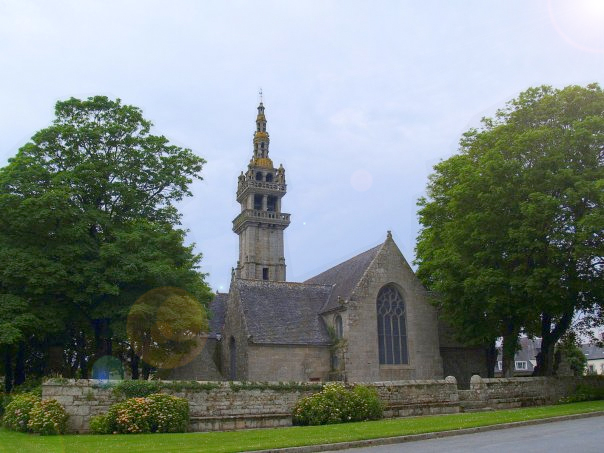 Chevet de la chapelle Notre-Dame de Berven en Plouzévédé (29).